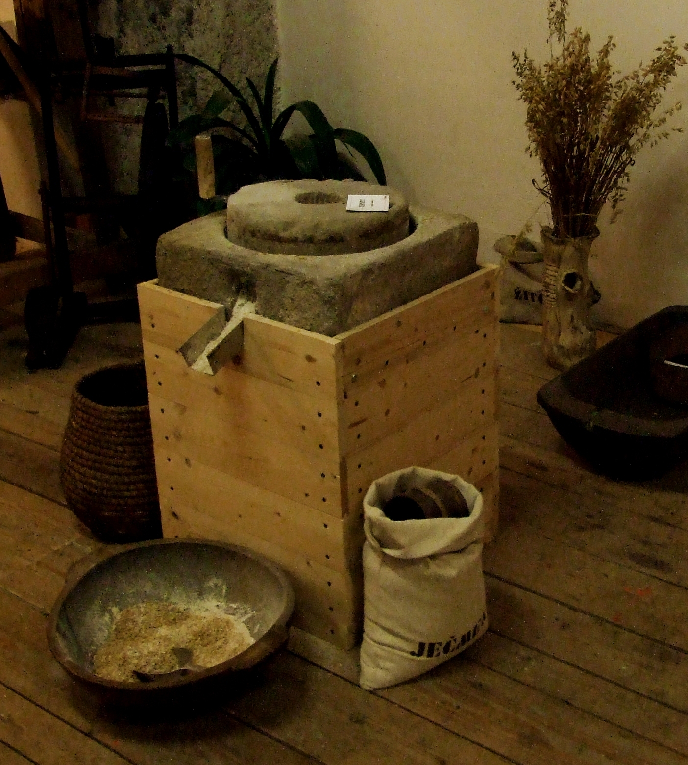 vlastní autorská fotografie exponátu v Muzeu Mlejn, Ostrava